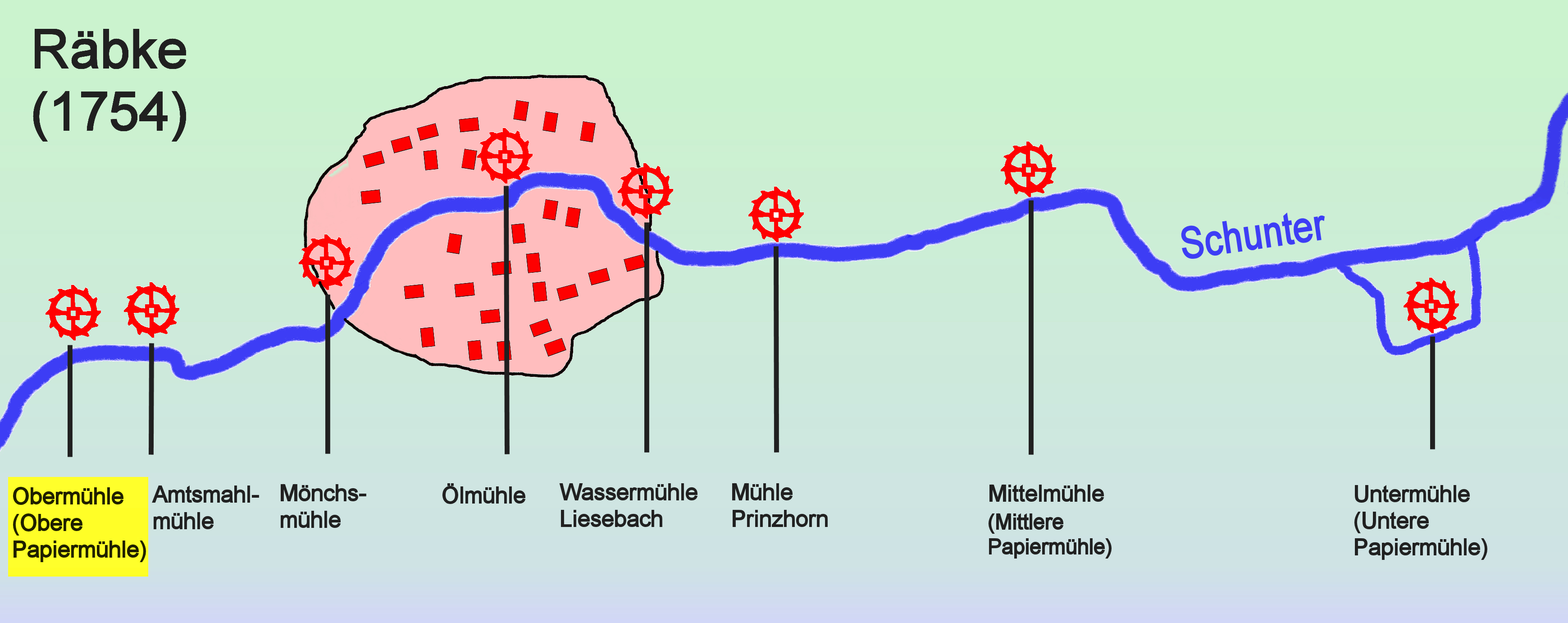 Die Obermühle in Räbke, Zeichnung nach der Braunschweigischen General-Landesvermessung von 1754